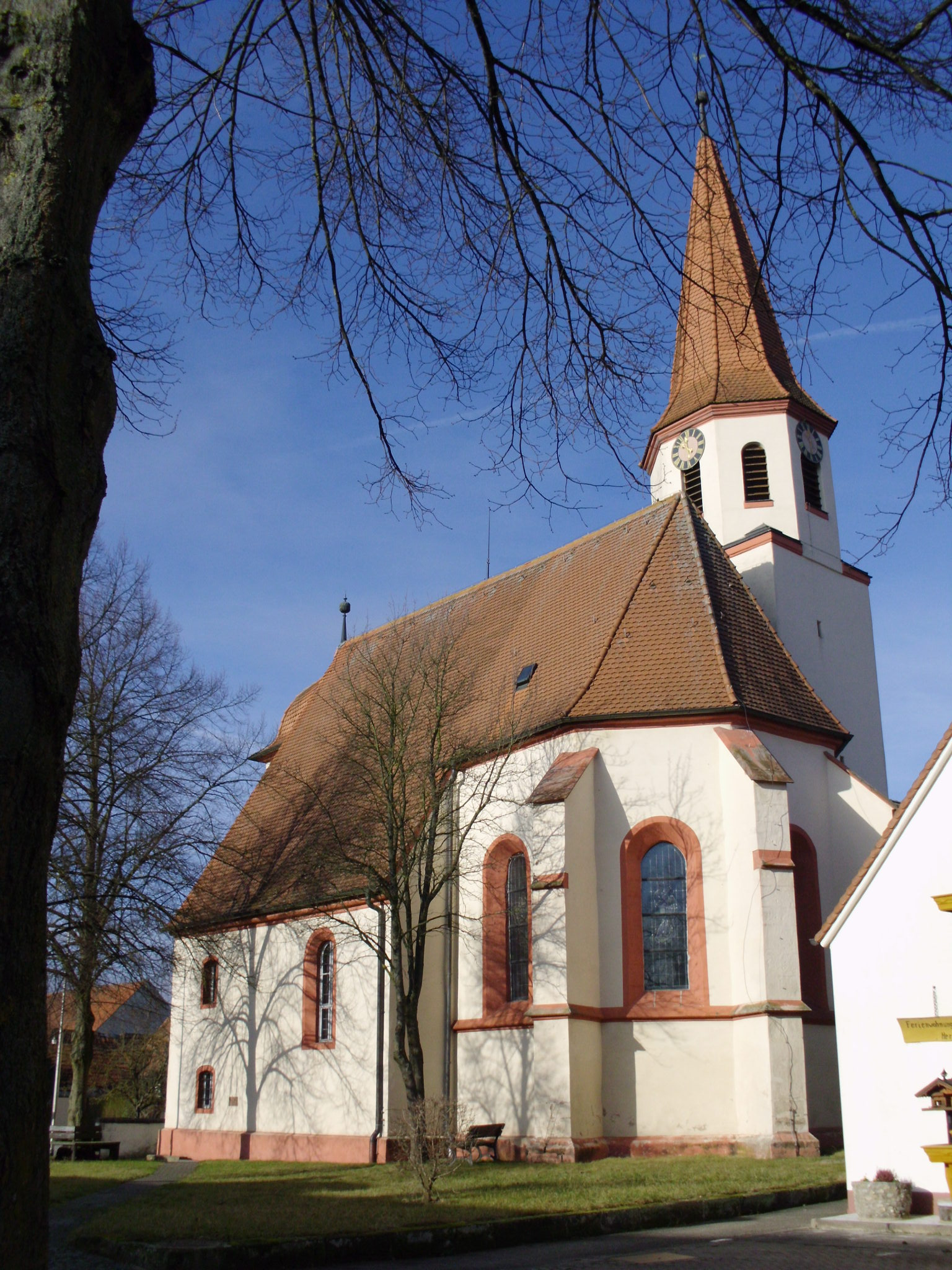 Laubenzedel, Ortsteil von Gunzenhausen im Landkreis Weißenburg-Gunzenhausen (Bayern), Evang.-lutherische Pfarrkirche St. Sixtus